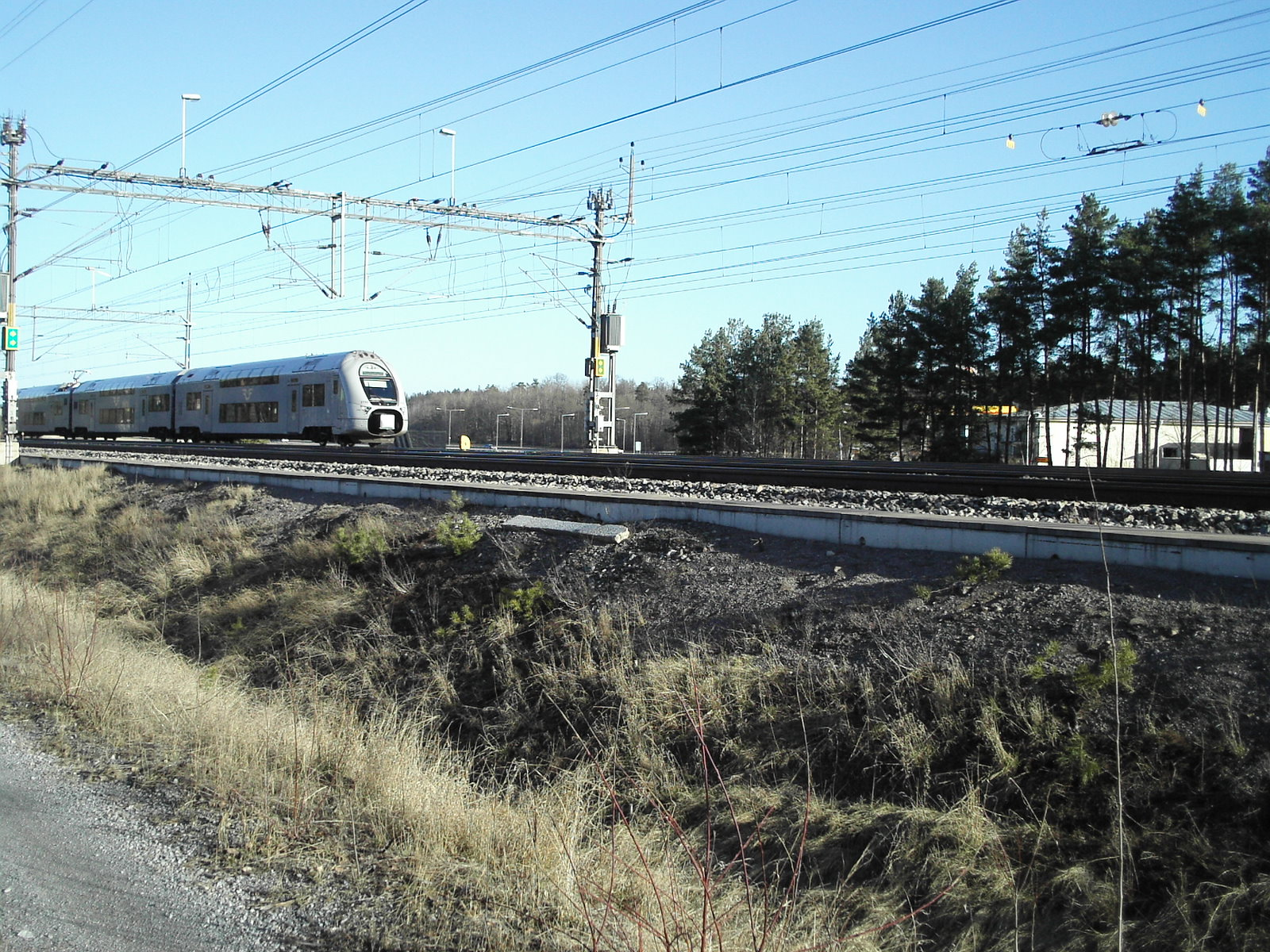 Tvåvåningståget X40 mellan Gävle och Linköping